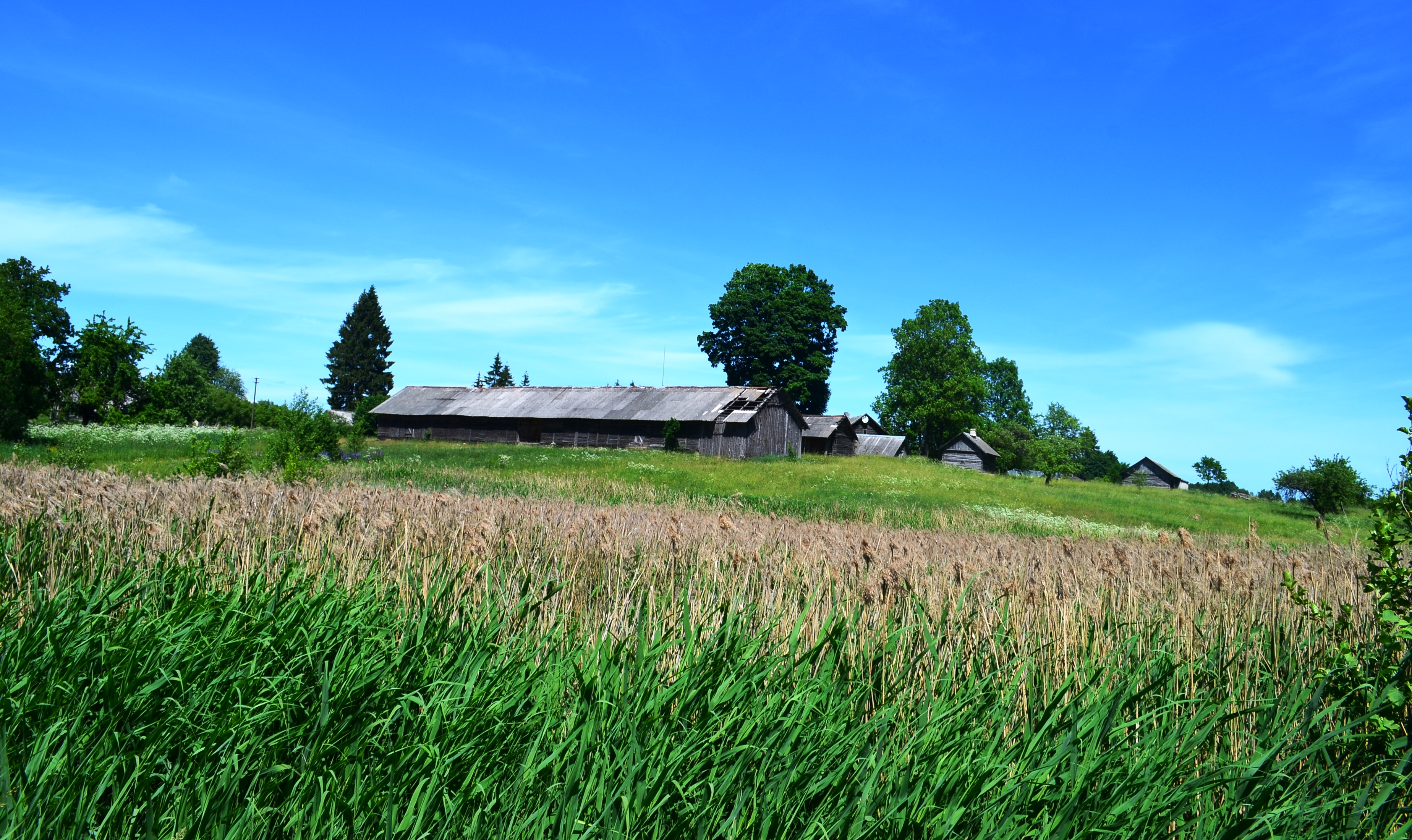 Pavarpiai, Vilniaus r.